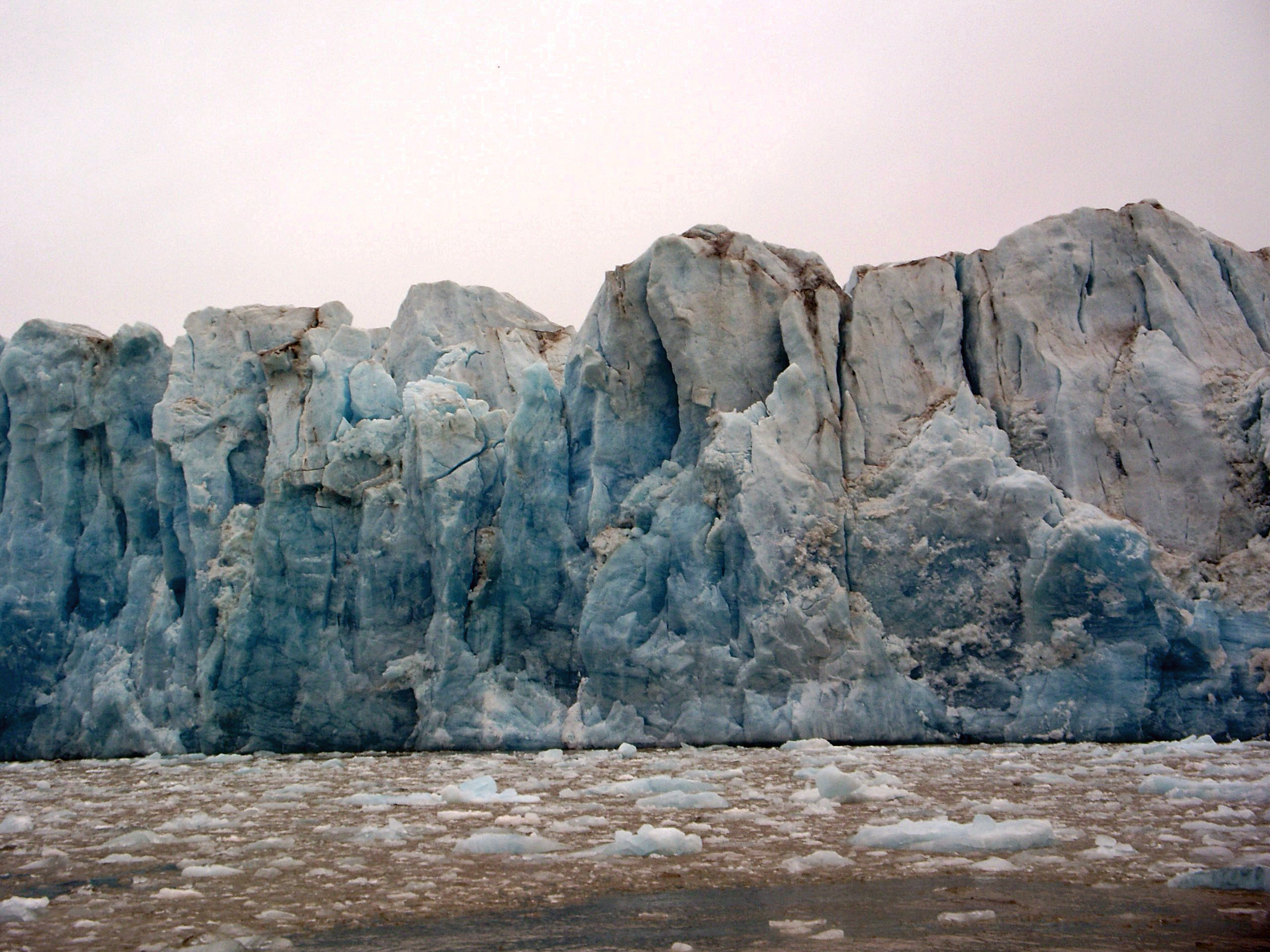 Glacier front of the Kongsvegen glacier in Kongsfjorden, Spitsbergen (Svalbard).